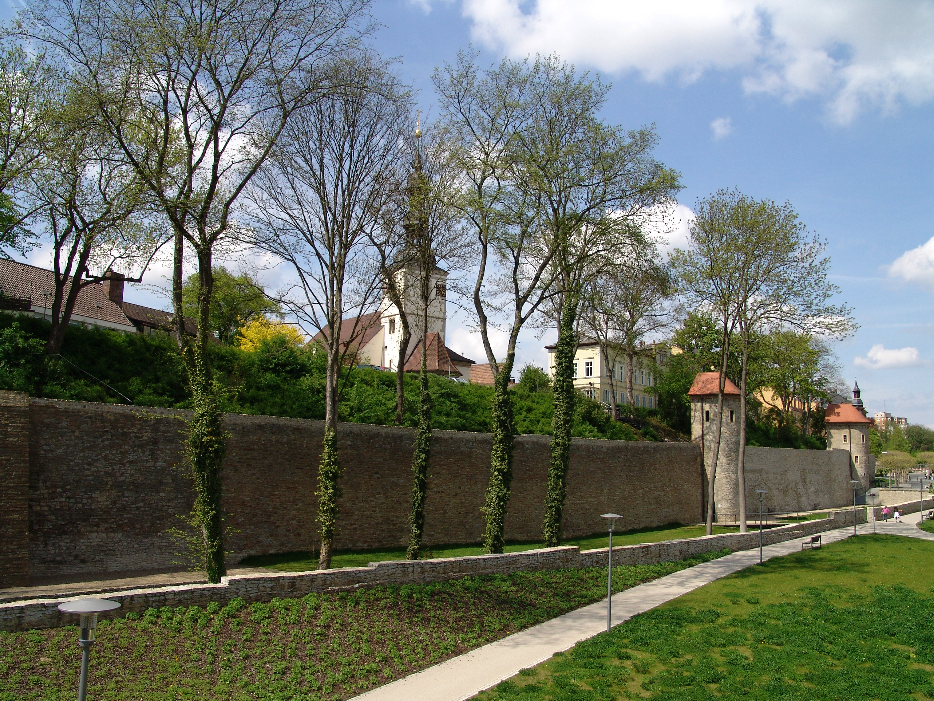 Stadtmauer mit Pulvertürmen